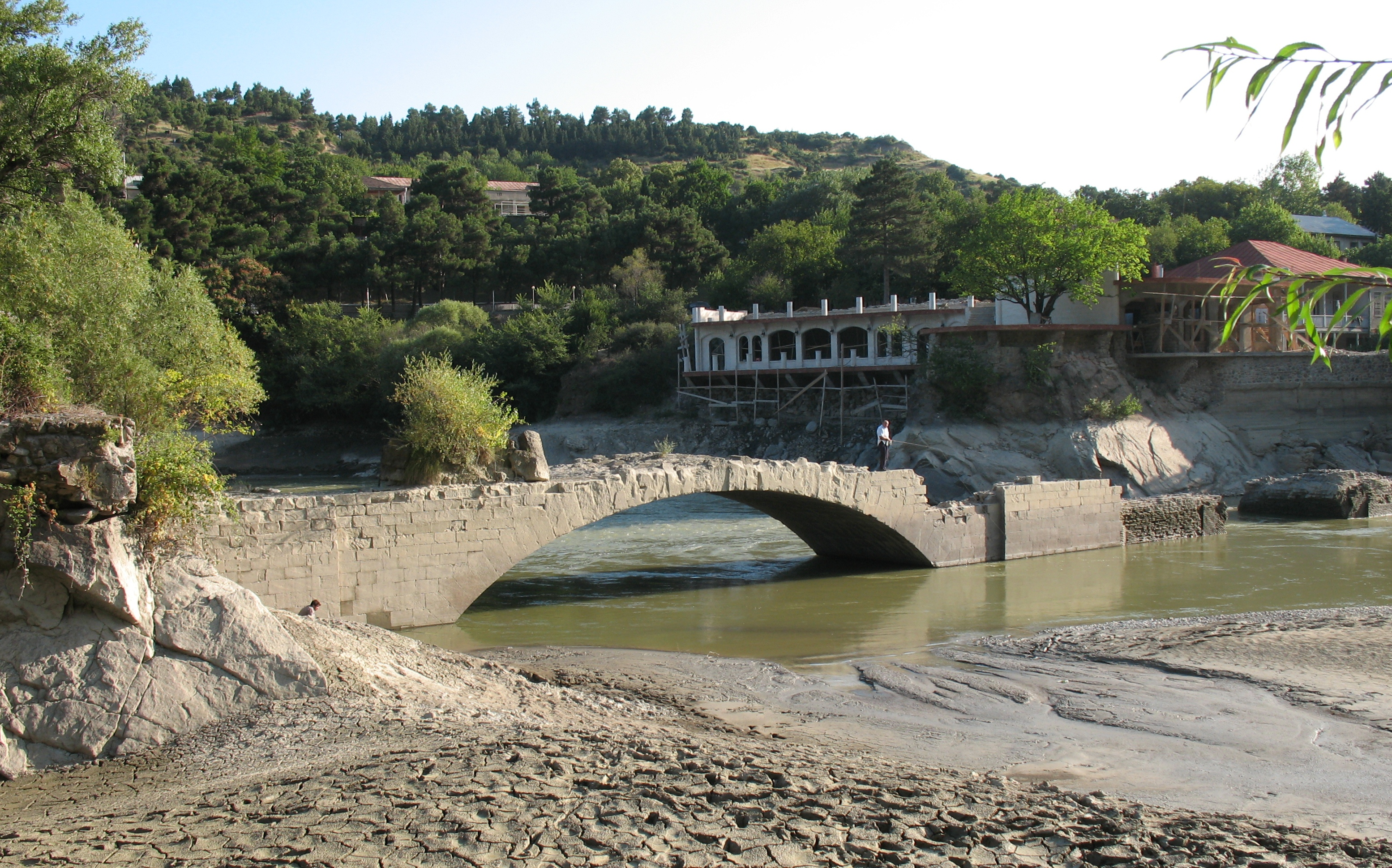 პომპეუსის ხიდი